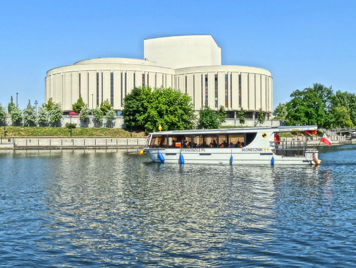 Budynek Opery Nova, zbud. w latach 1973-2006 w Bydgoszczy, ul. Ferdynanda Focha 5